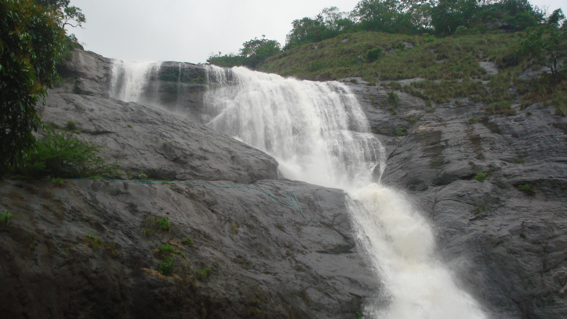 പാലരുവി വെള്ളച്ചാട്ടം